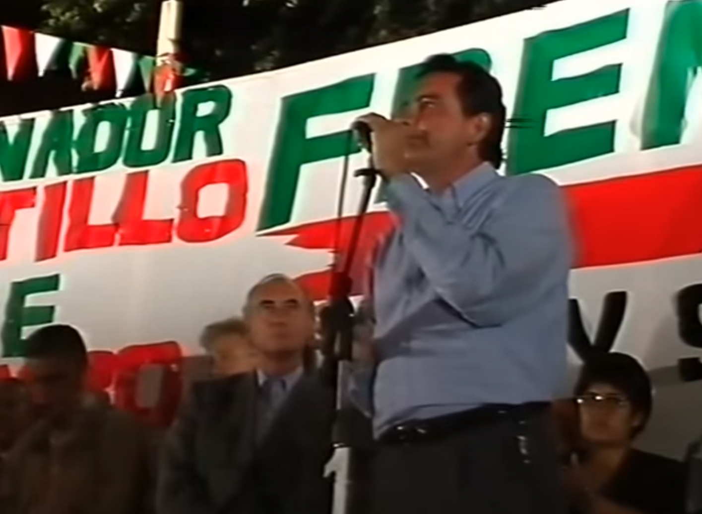 Acto de campaña de Oscar Castillo en Santa María, para las elecciones provinciales de Catamarca de marzo de 1999.